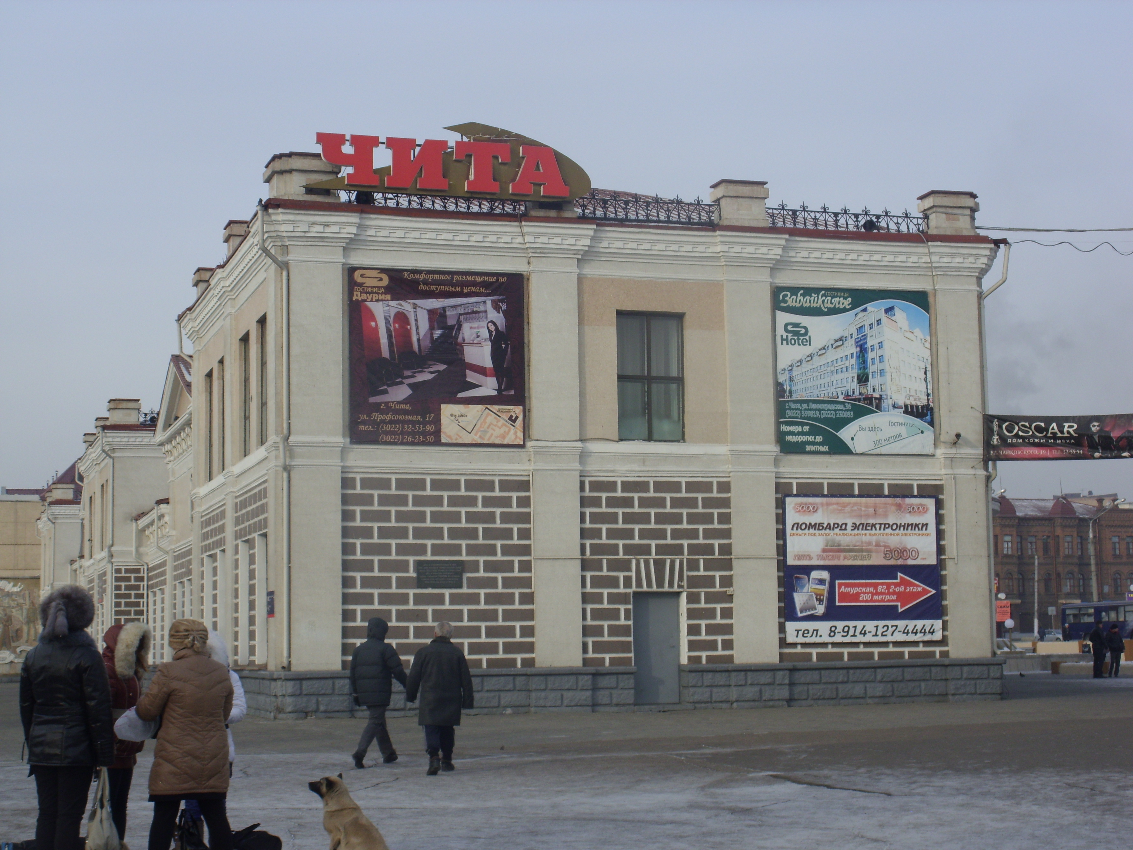 Железнодорожная станция Чита-2